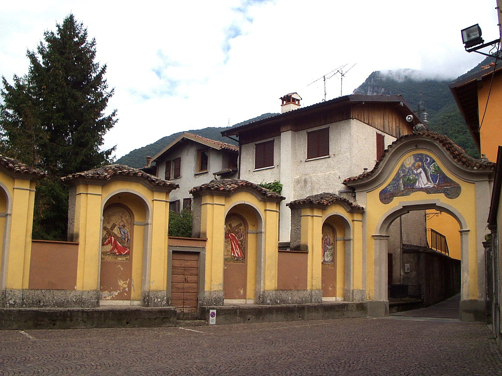 Monasterolo del castello via crucis stazioni I - II - III